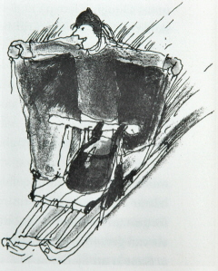 Teckning i Livet, ett spektakel